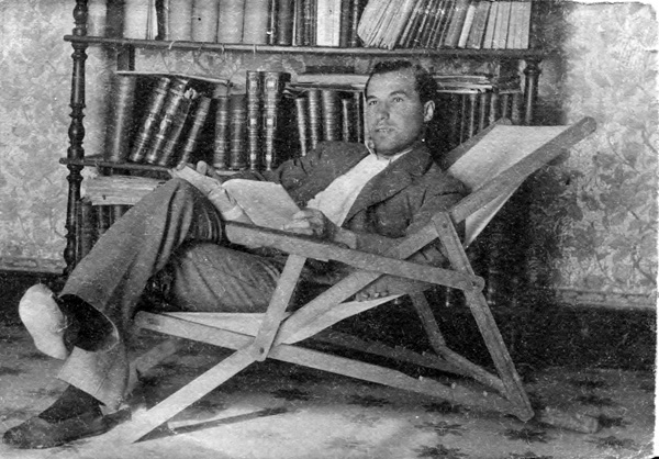 Germán Bernácer Tormo en su despacho de la Playa de San Juan (Alicante)